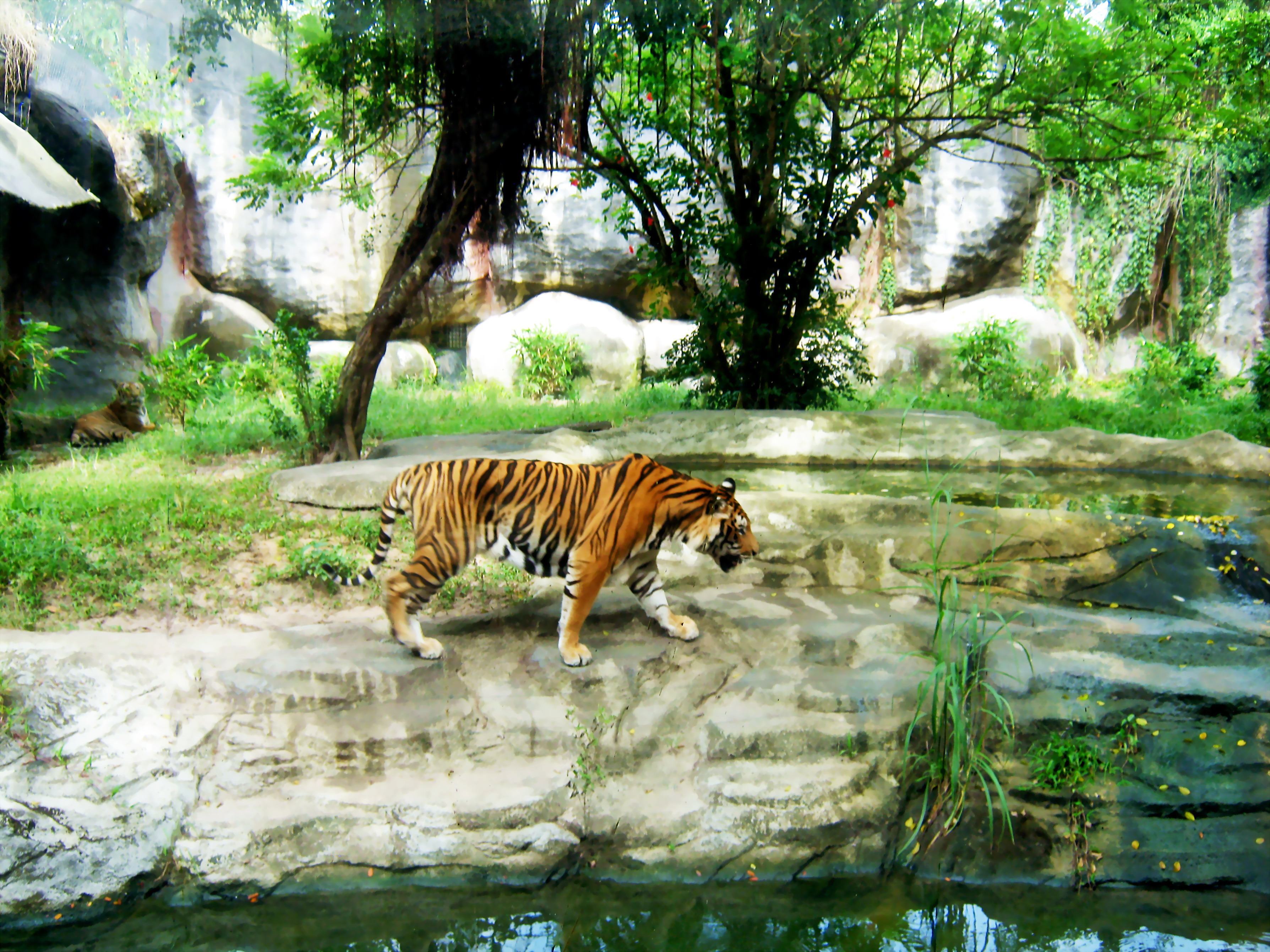 Hổ Đông Dương trong vườn thú ở trong khu du lịch Đại Nam (Bình Dương, Việt Nam)